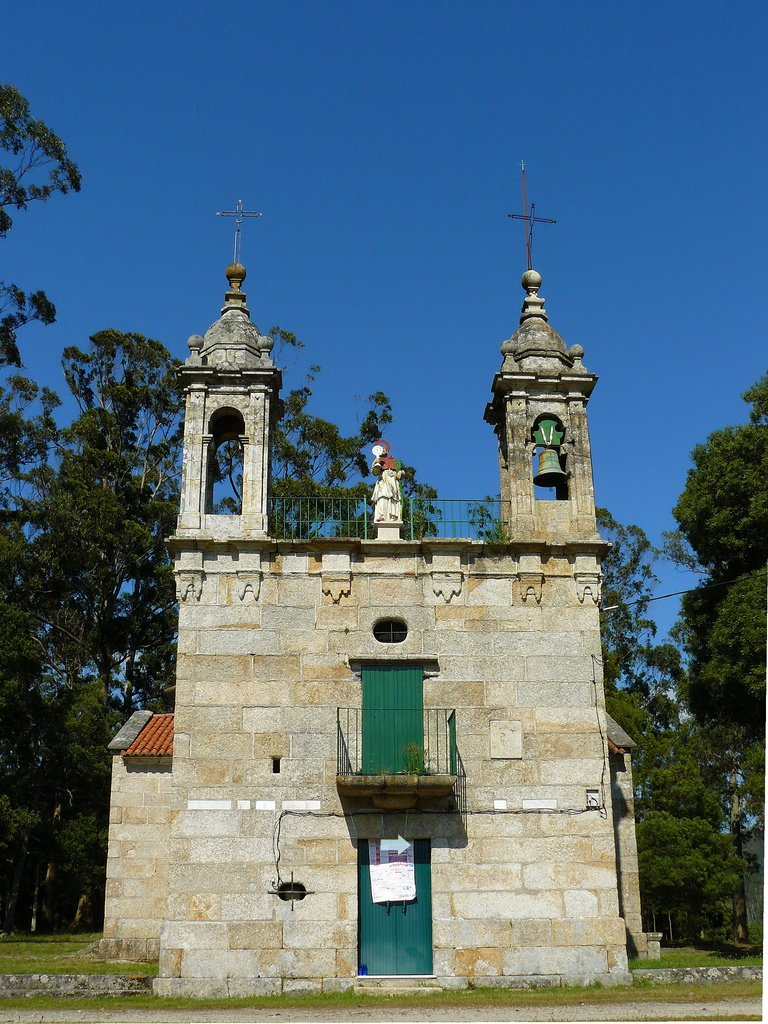 Ermida de San Ramón de Bealo, Boiro, Galiza